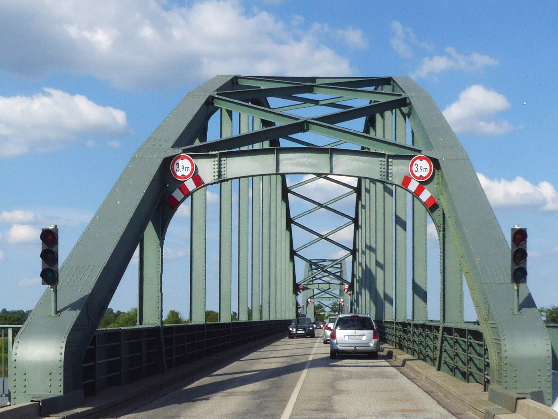 Die Eiderbrücke wurde 1916 fertiggestellt, dient heute der Landesstraße L 156 zwischen Friedrichstadt und Sankt Annen zur Überquerung des Flusses Eider. Es ist eine Denkmal-geschützte Doppel-Bogenbrücke mit einer Länge von 245 m in Schleswig-Holstein Foto Wolfgang Pehlemann P1230657